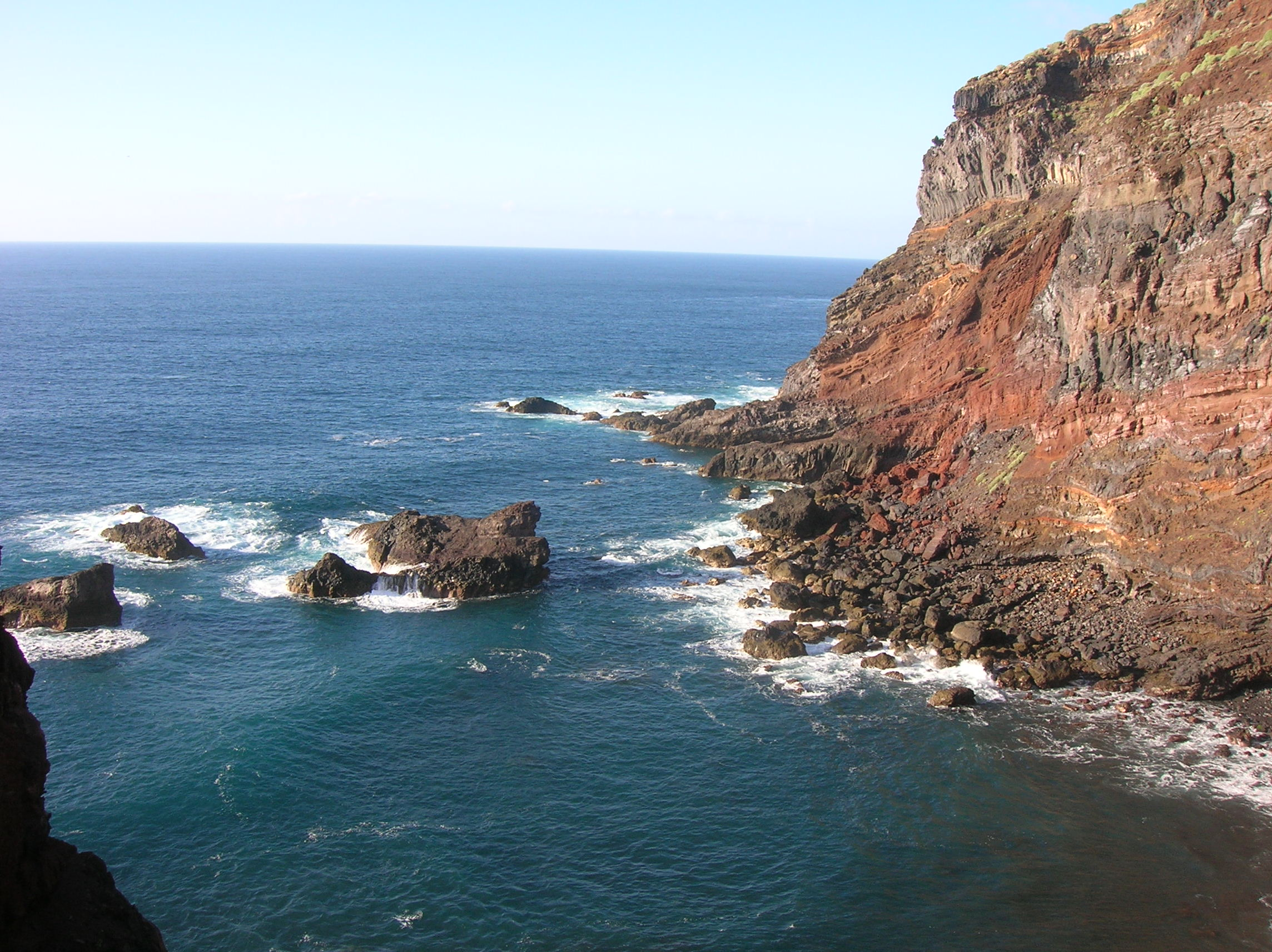 Noordwestkust van La Palma